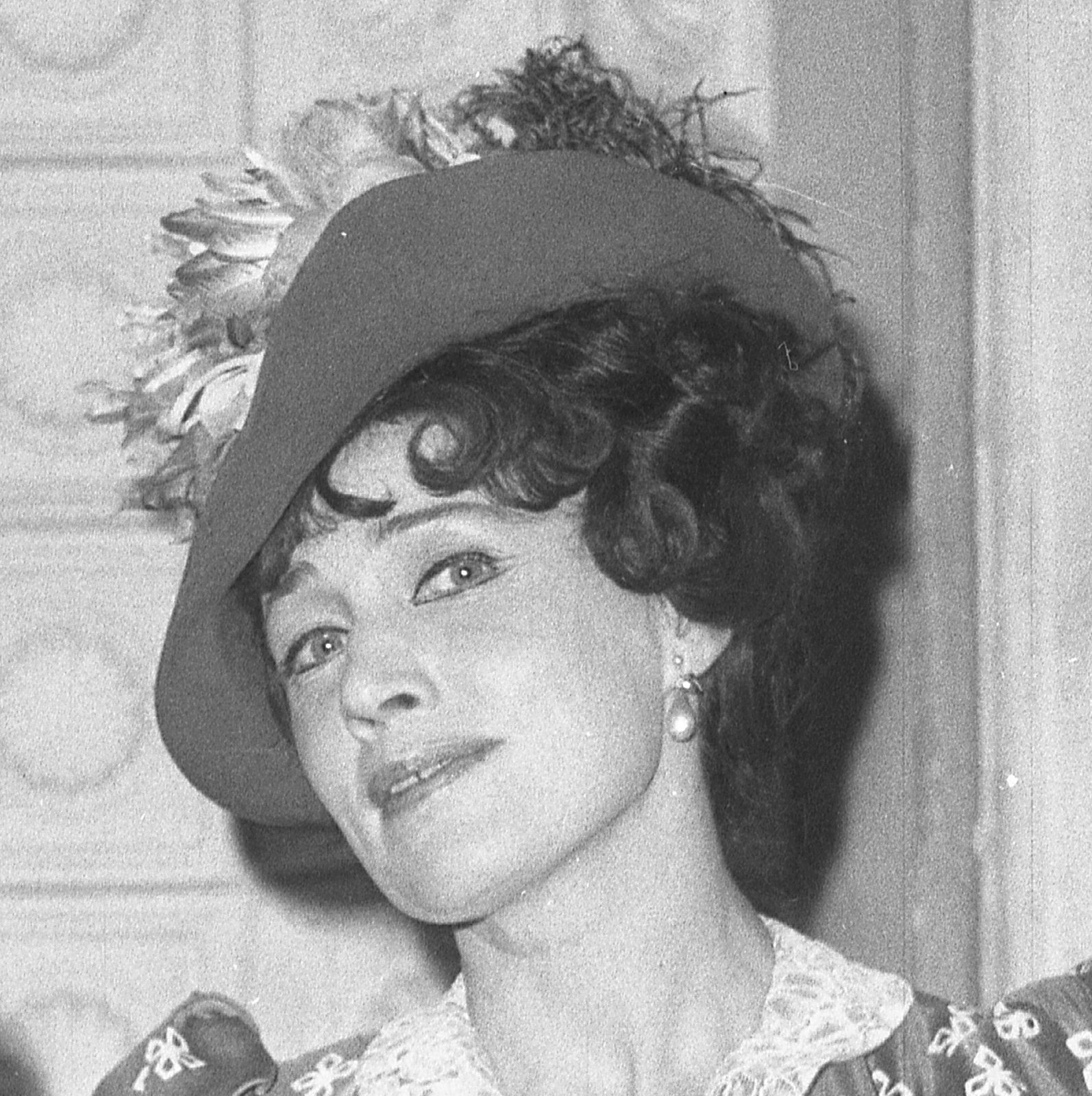 Format: 120 mm sort/hvitt negativ [utsnitt] Dato / Date: 1968 Fotograf / Photographer: Eirik Sundvor (1902 - 1992) Sted / Place: Den Nationale Scene, Bergen Wikipedia: Rolf Berntzen (1918 - 2005) Store Norske Leksikon: Karin Simonnæs (1924 - 1984) Wikipedia: Kirsebærhagen (Anton Tsjekhov 1904) Eier / Owner Institution: Trondheim byarkiv, The Municipal Archives of Trondheim Arkivreferanse / Archive reference: Tor.H43.B78.F14632